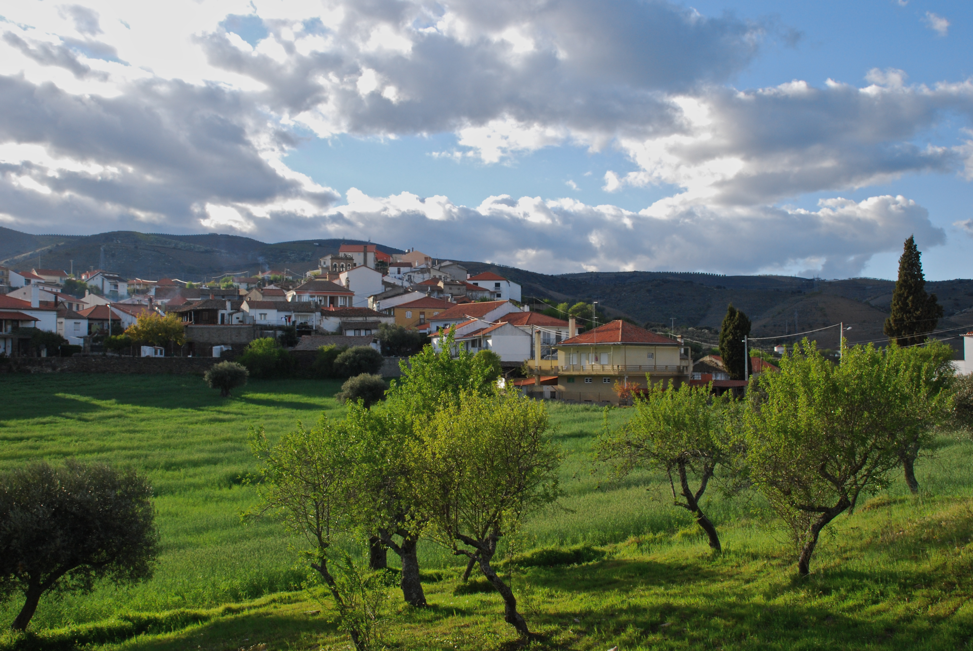 El Greco paira sobre Muxagata